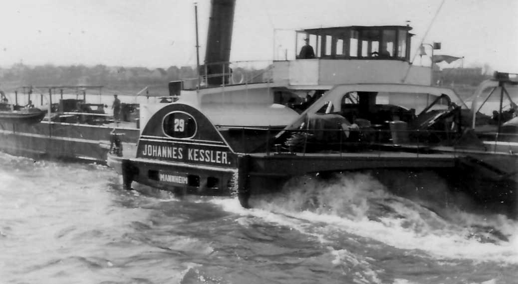 Schaufelraddampfschlepper Johannes Kessler